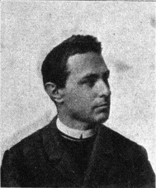 Österreichischer Politiker, Reichsratswahl 1907, Name siehe Dateiname